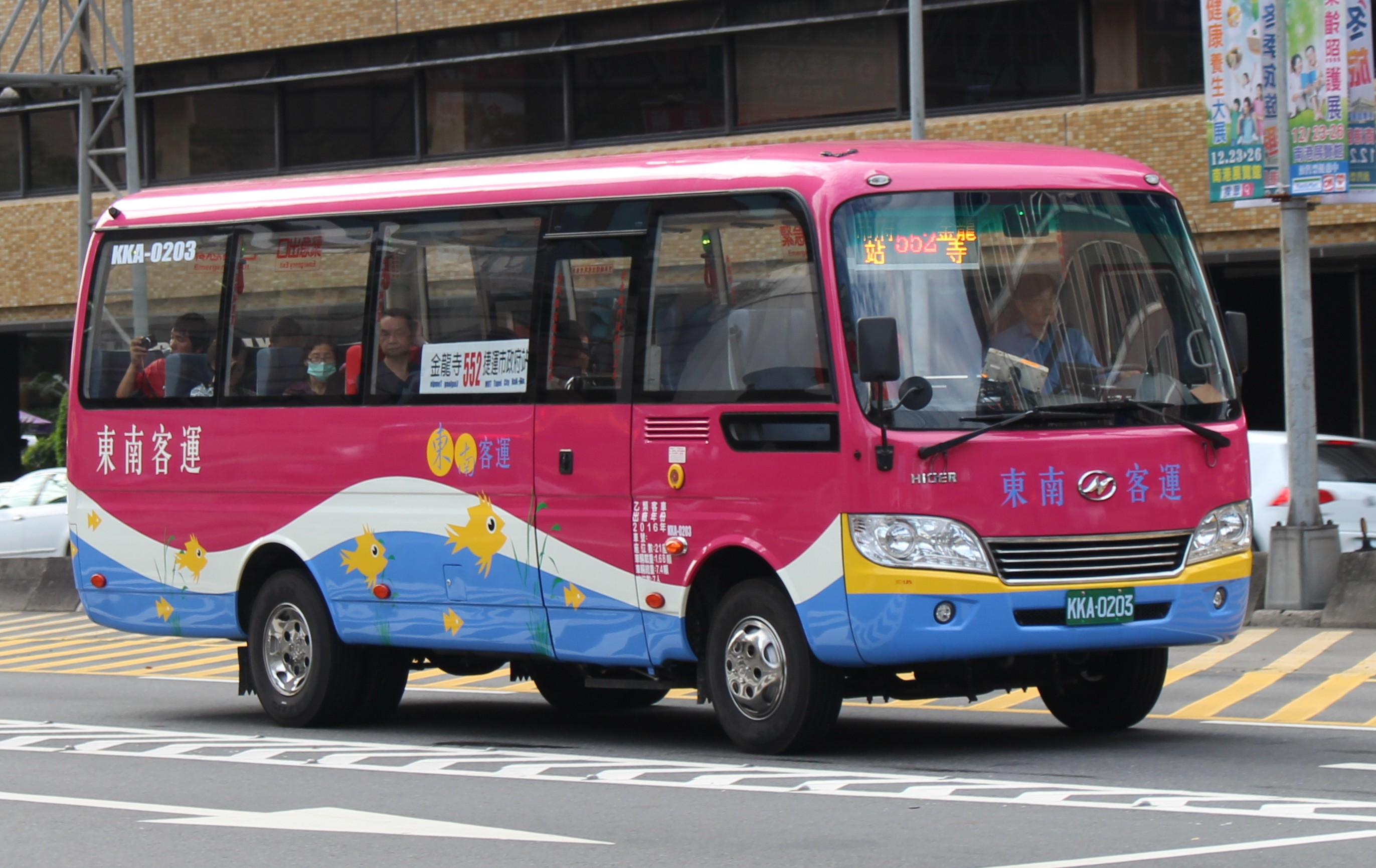 東南客運 2016 HIGER KLQ6759 KKA-0203 552.jpg